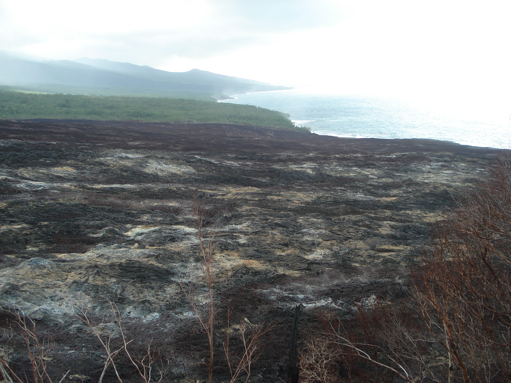 photo de la coulée d'avril 2007 du piton de la fournaise sur l'île de la Réunion